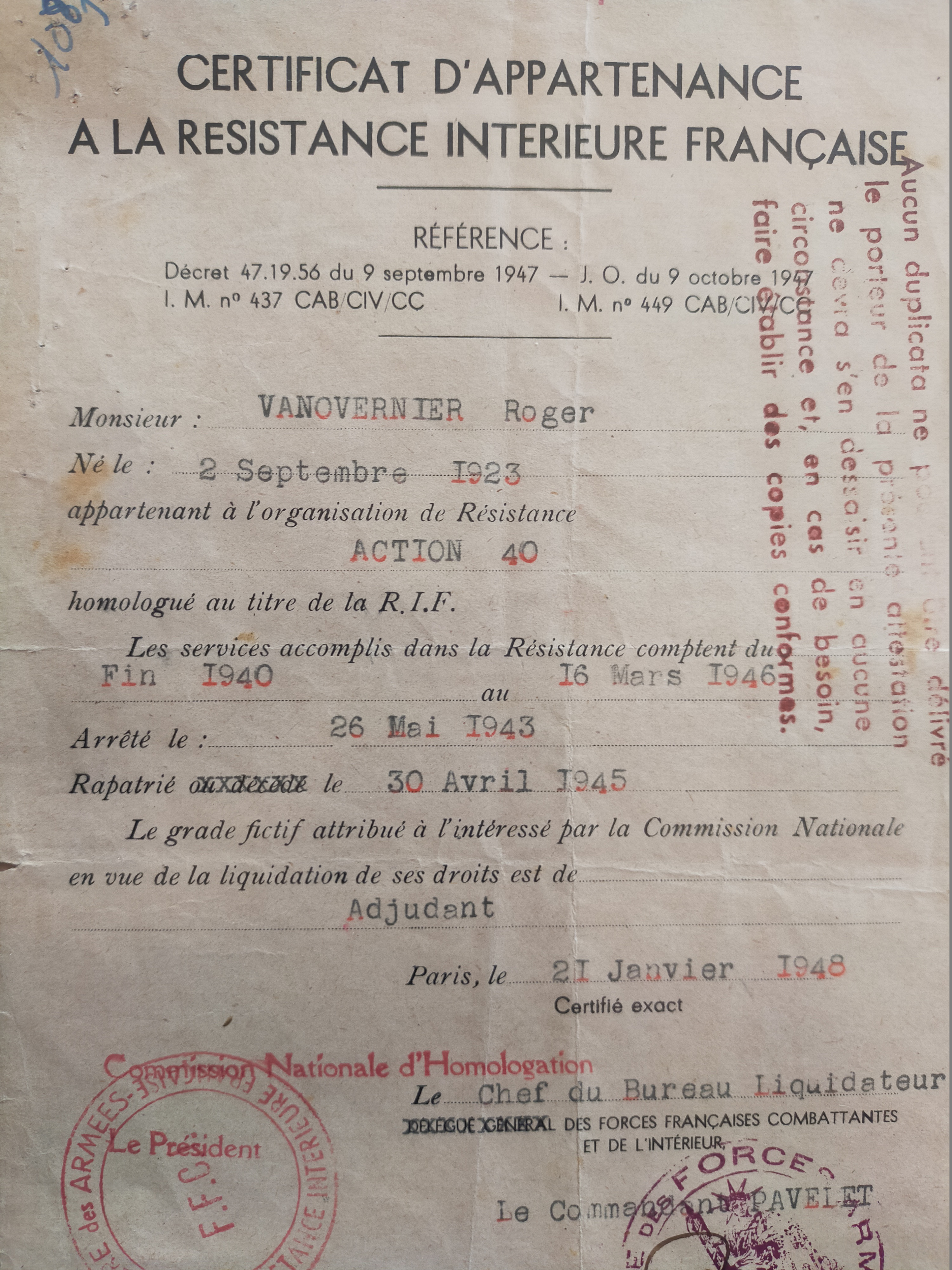 Certificat d'appartenance à la Résistance intérieure remis à Roger Vanovermeir (archive familiale)